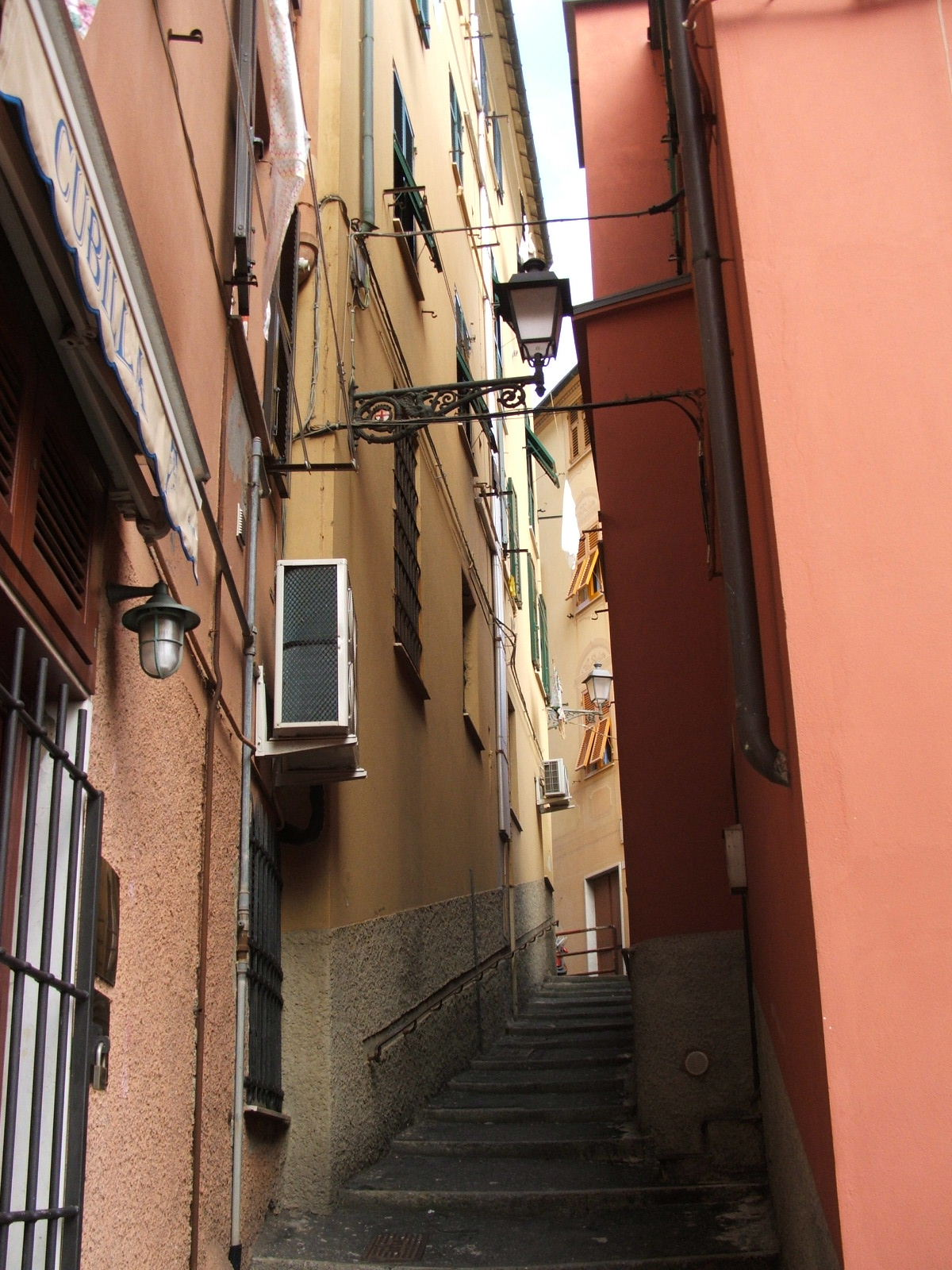 Immagine dalla città di Genova Nervi, antica creuza di mare